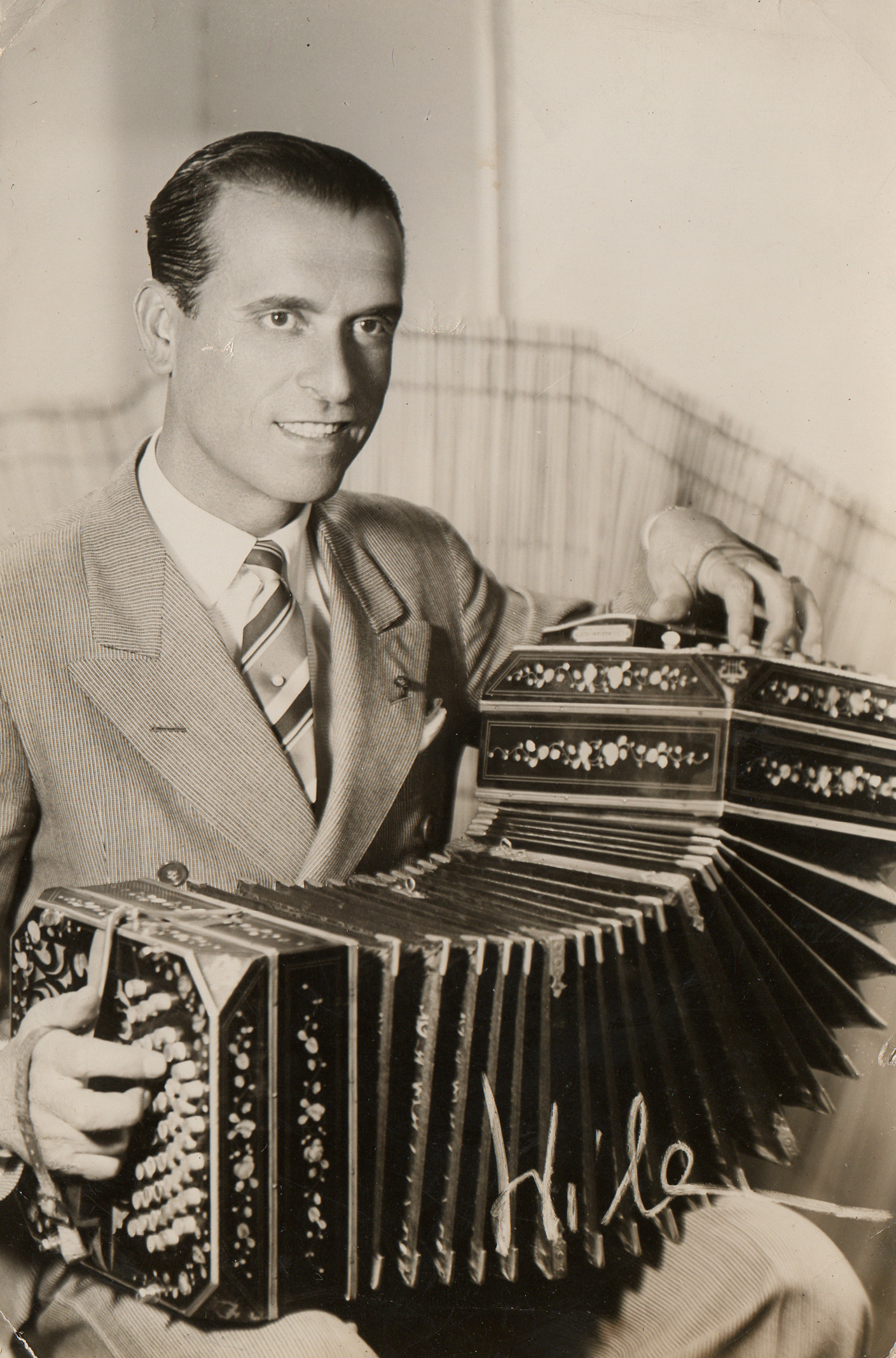 Foto de Pedro Laurenz